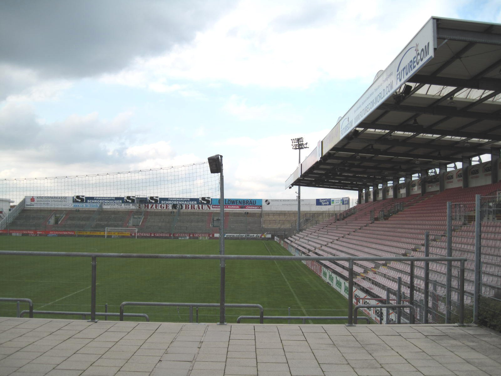 Unterhaching, Sportpark, Ansicht vom Südeingang: Nord- und Osttribüne